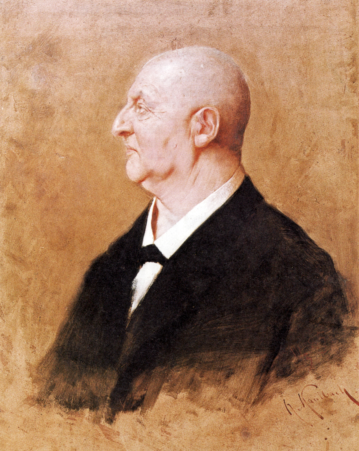 Porträt Anton Bruckner (1824-1896)